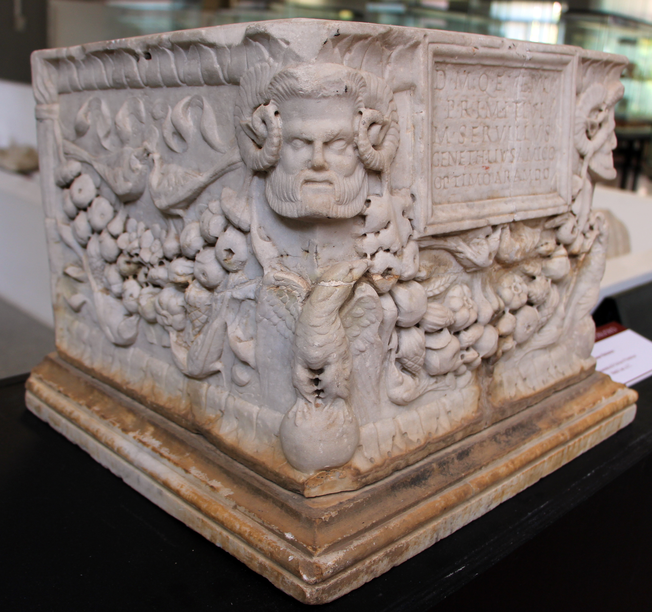 Museo archeologico nazionale G.A. Sanna - MIBAC The making of this document was supported by Wikimedia CH. (Submit your project!) For all the files concerned, please see the category Supported by Wikimedia CH. This is a photo of a monument which is part of cultural heritage of Italy.